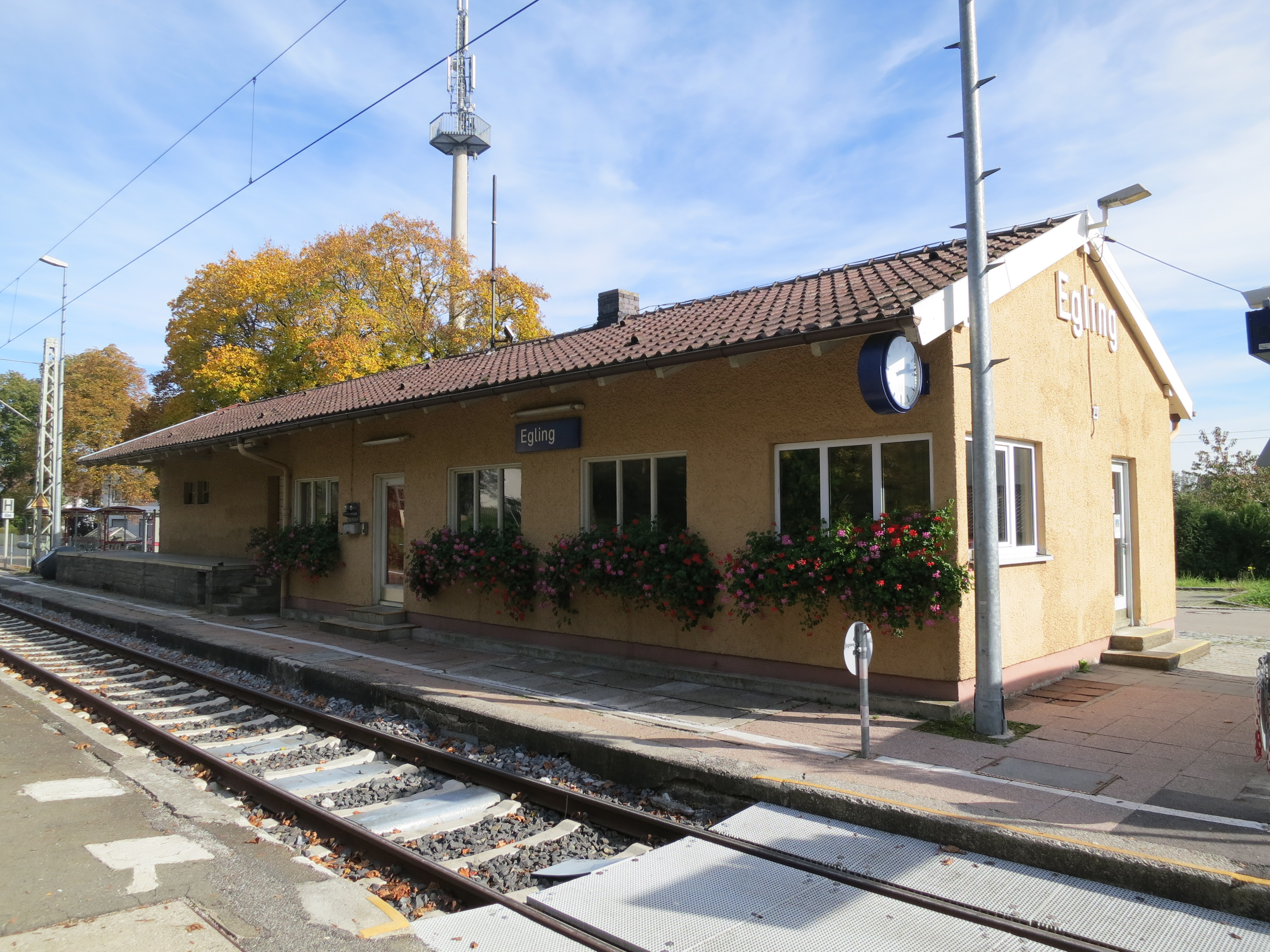 Empfangsgebäude des Bahnhofs Egling an der Ammerseebahn von der Gleisseite